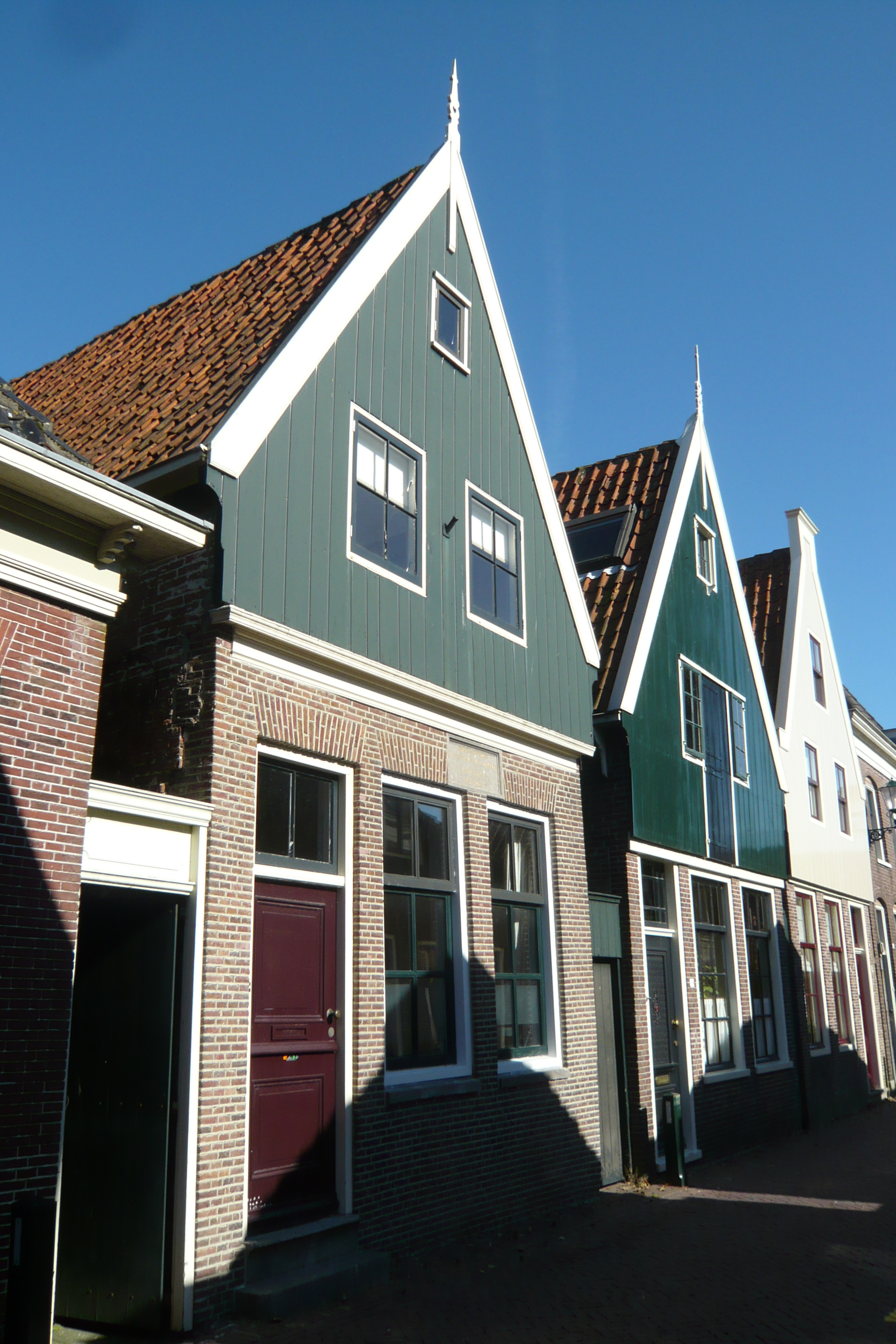 De Rijp-Rechtestraat 40, voormalig woonhuis van de schrijfsters Betje Wolff en Aagje Deken.